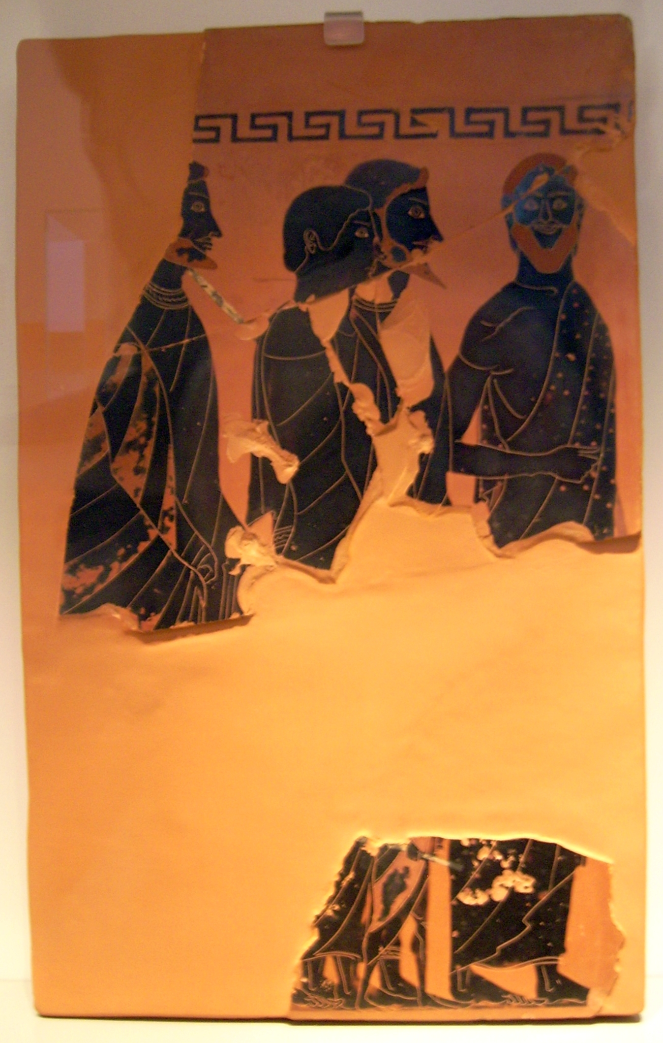 Grabpinakes des Vasenmalers Exekias, eine von 16 im schwarzfigurigen Stil bemalte Tontafeln, eine Prothesis (Totenklage) und einen Totenzug darstellend, gefunden auf dem Kerameikos in Athen, zwischen 540 und 530 v. Chr., 43 × 37 cm, Antikensammlung Berlin